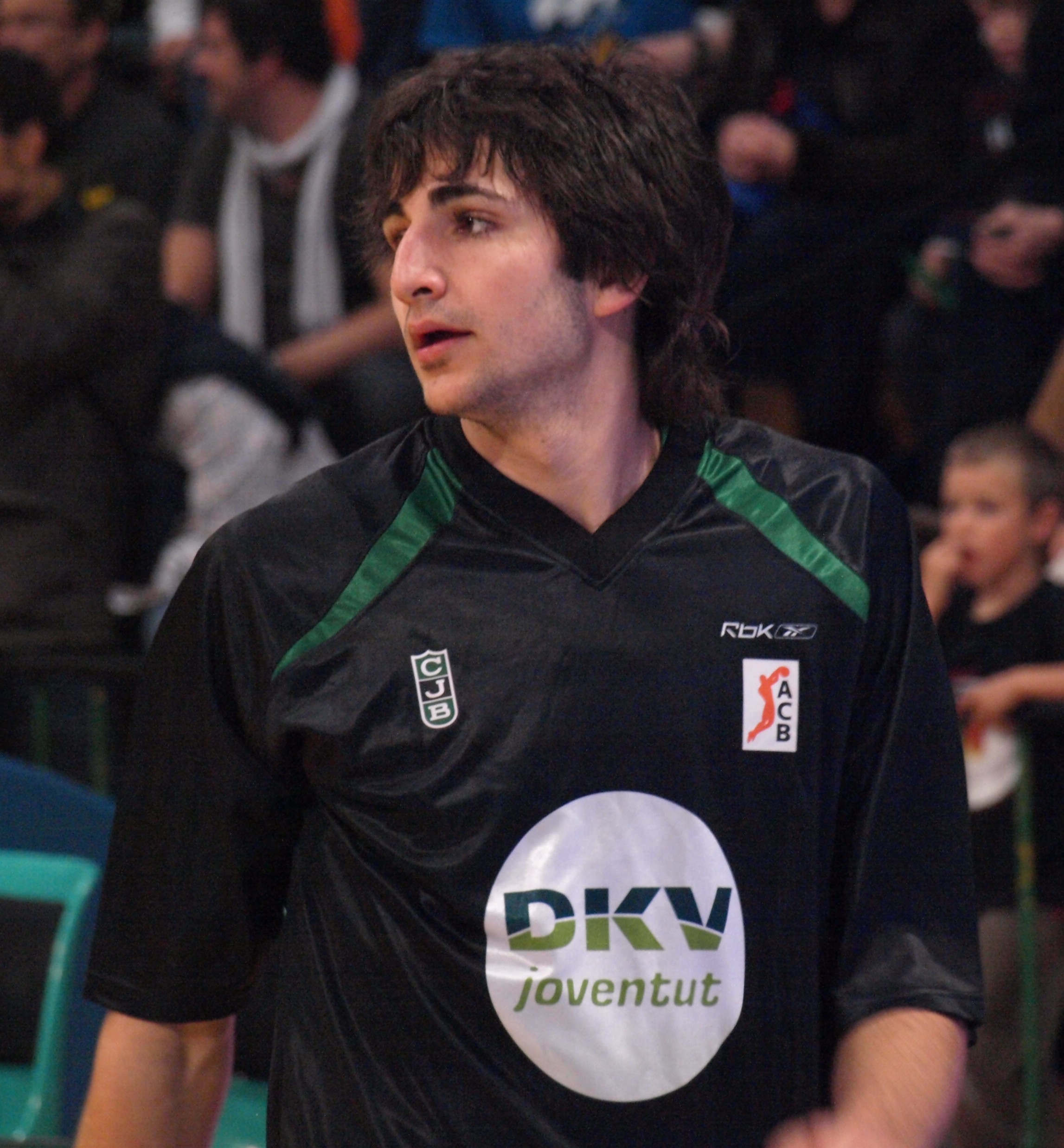 Ricky Rubio en el Olímpico de Badalona